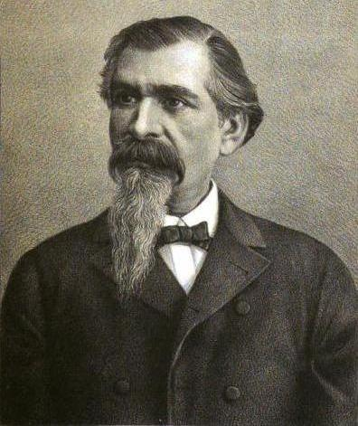 Portrait of Petre Ispirescu. The picture was copied from Proverbele Românilor din România, Basarabia, Bucovina, Ungaria, Istria şi Macedonia, Volume 3 by Iuliu A. Zanne, published in 1899.